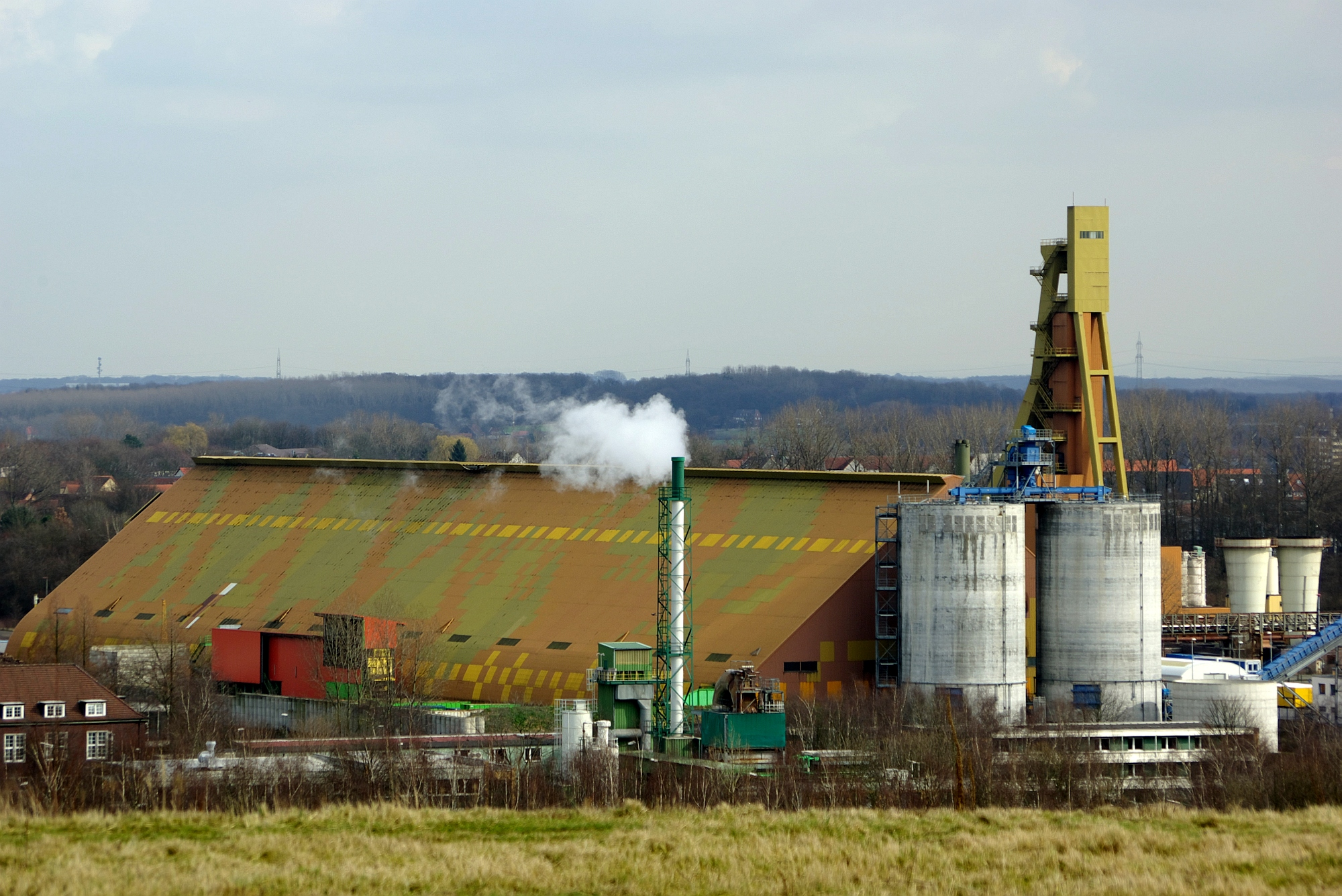 Bergkamen